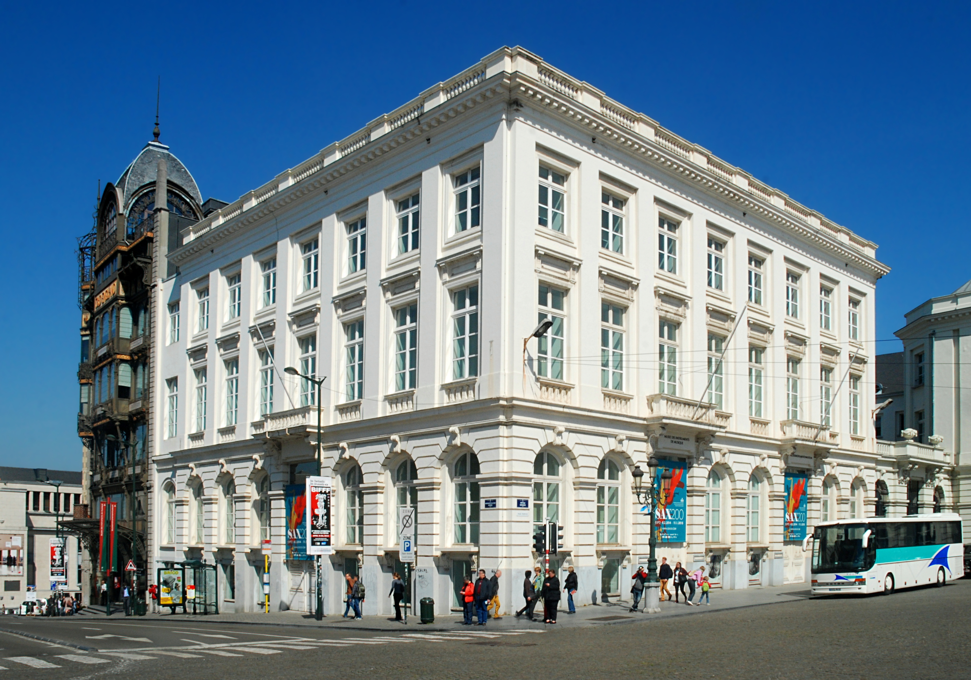 Belgique - Bruxelles - Place Royale - Hôtel de Spangen